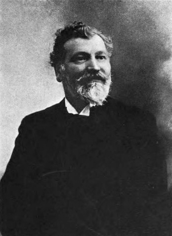 Photographie sur la page de frontispice de l'ouvrage Contes bretons, from the works of Anatole Le Braz, introduction de Charles A. Bruce. Henry Holt, New York, 1915